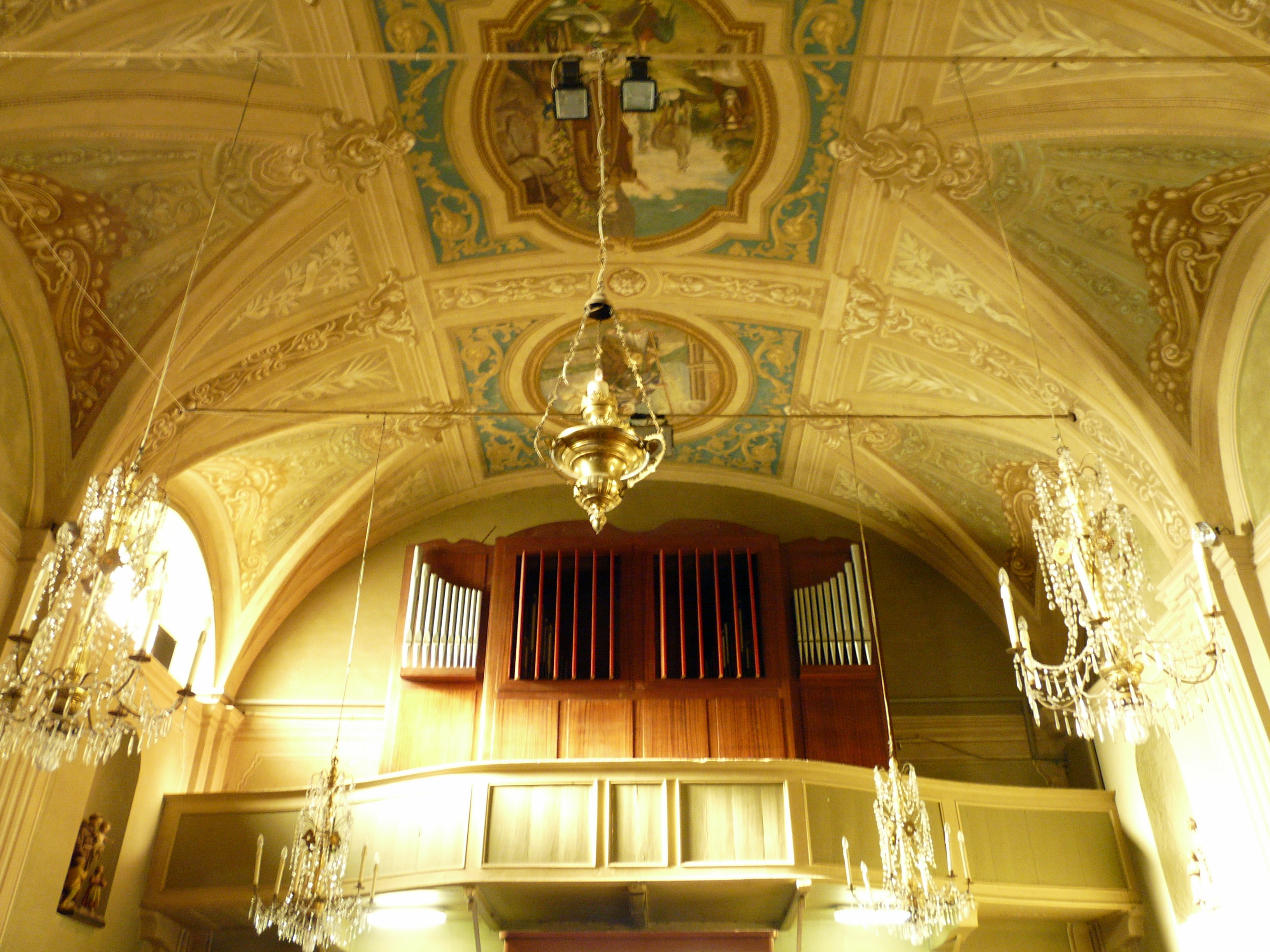 La chiesa di San Rocco a Recco, Liguria, Italia